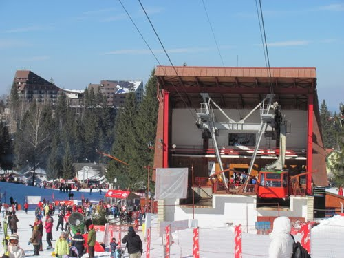 Telecabina Capra Neagra in statie (seamana foarte bine cu telecabina din stanga-Hoher Kasten, Elvetia)